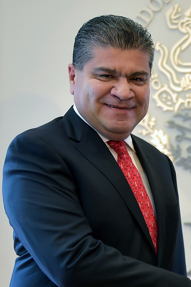 Reunión con Miguel Riquelme, gobernador electo de Coahuila tras las elecciones estatales de 2017.